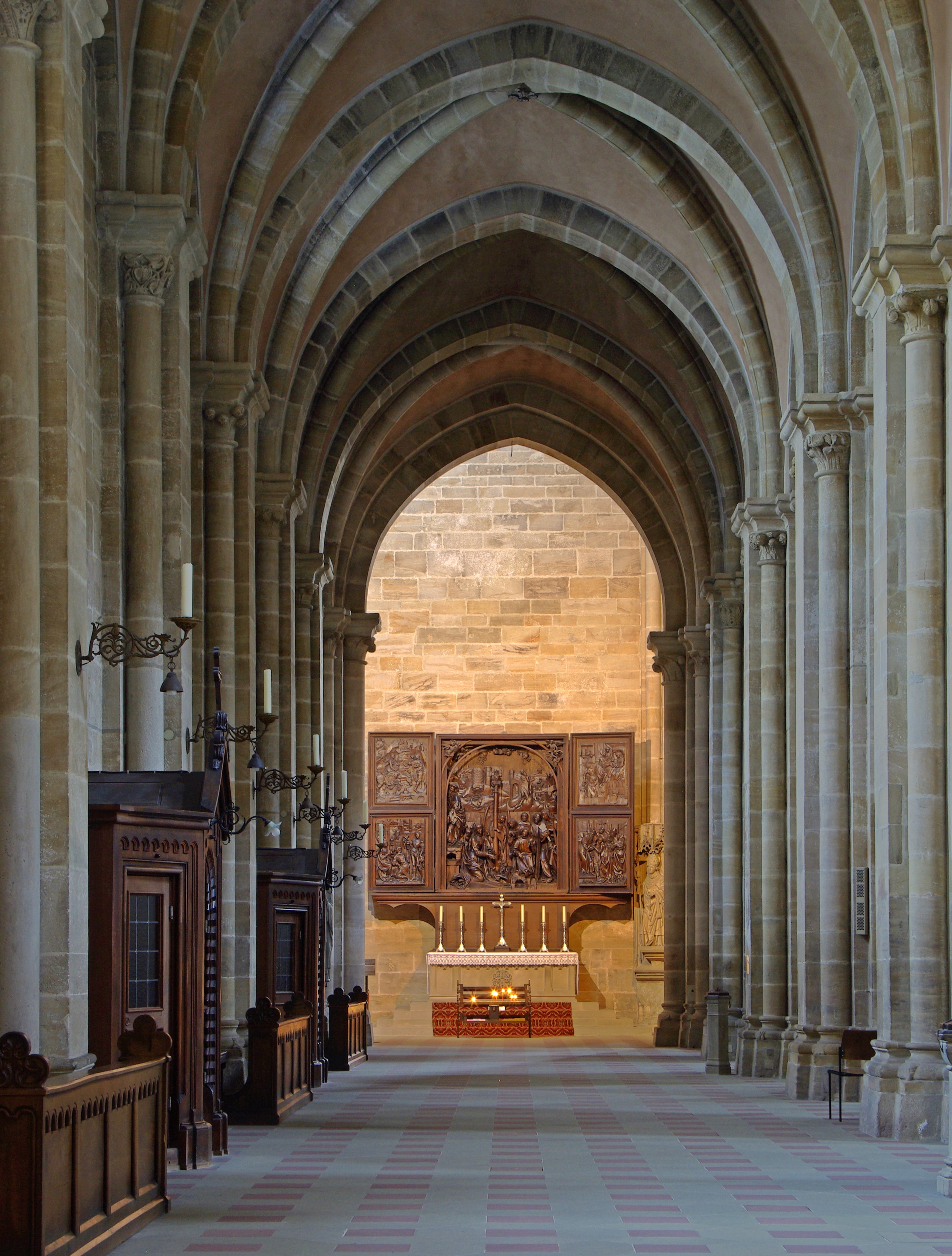 Bamberger Dom, Linkes Seitenschiff mit Veit-Stoß-Altar